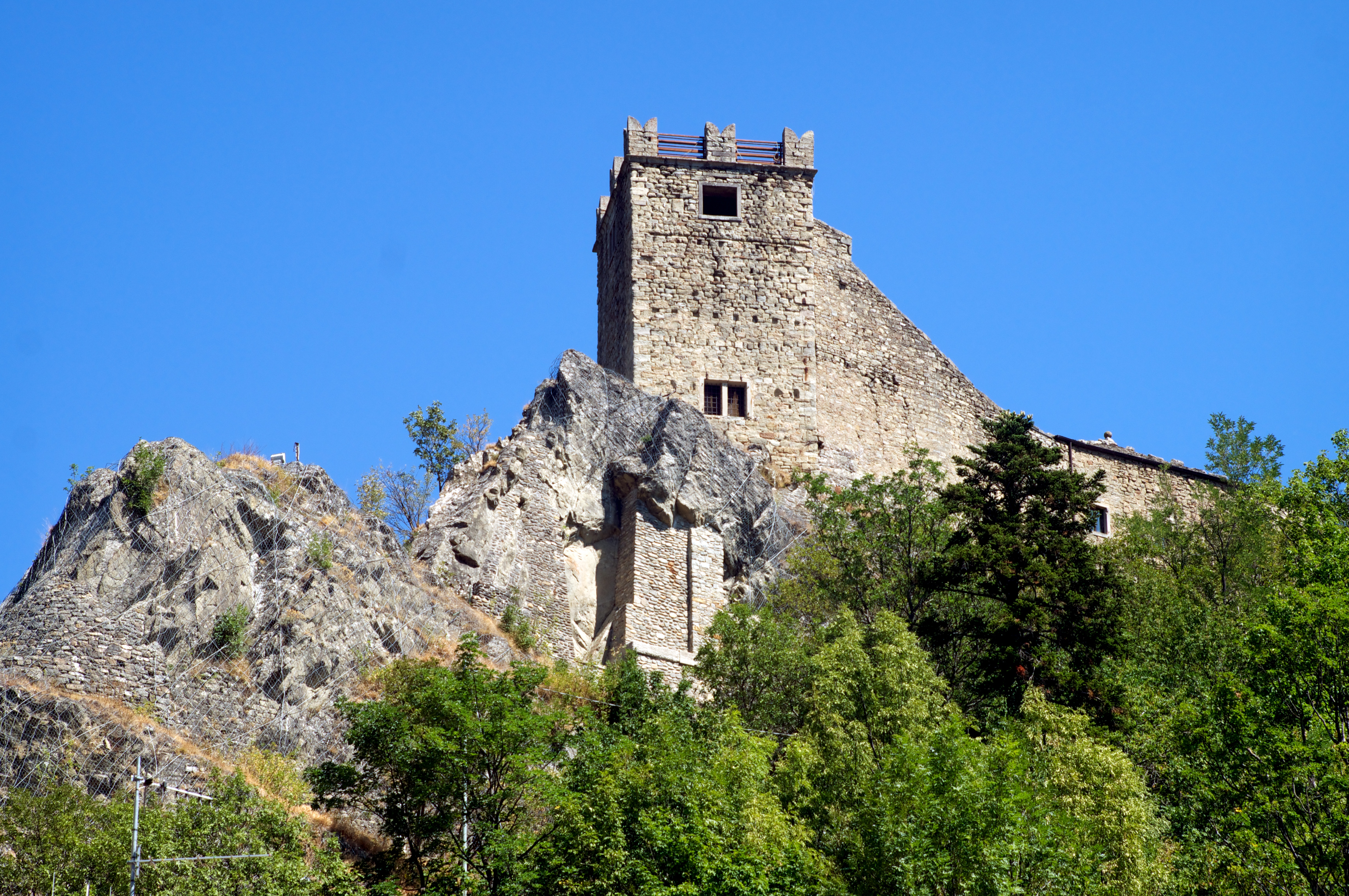 Castello di Sestola - MIBAC Scatto eseguito in una mattinata dell'agosto 2012, dal paese di Sestola. This is a photo of a monument which is part of cultural heritage of Italy.